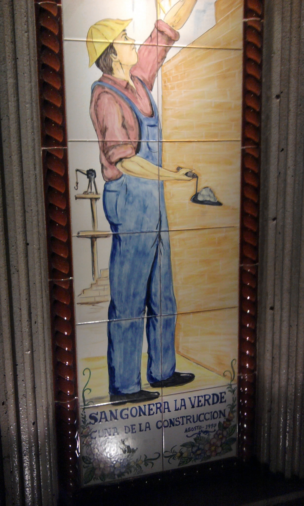 Monumento a la Construccion en la Plaza de Sangonera la Verde (Murcia)